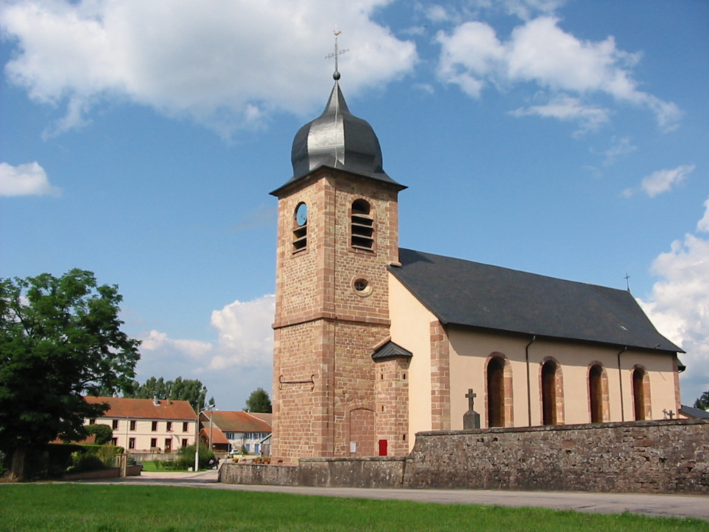 La Bourgonce Commune des Vosges L'église Saint-Denis Photographie personnelle, prise le 15 août 2006 Copyright © Christian Amet